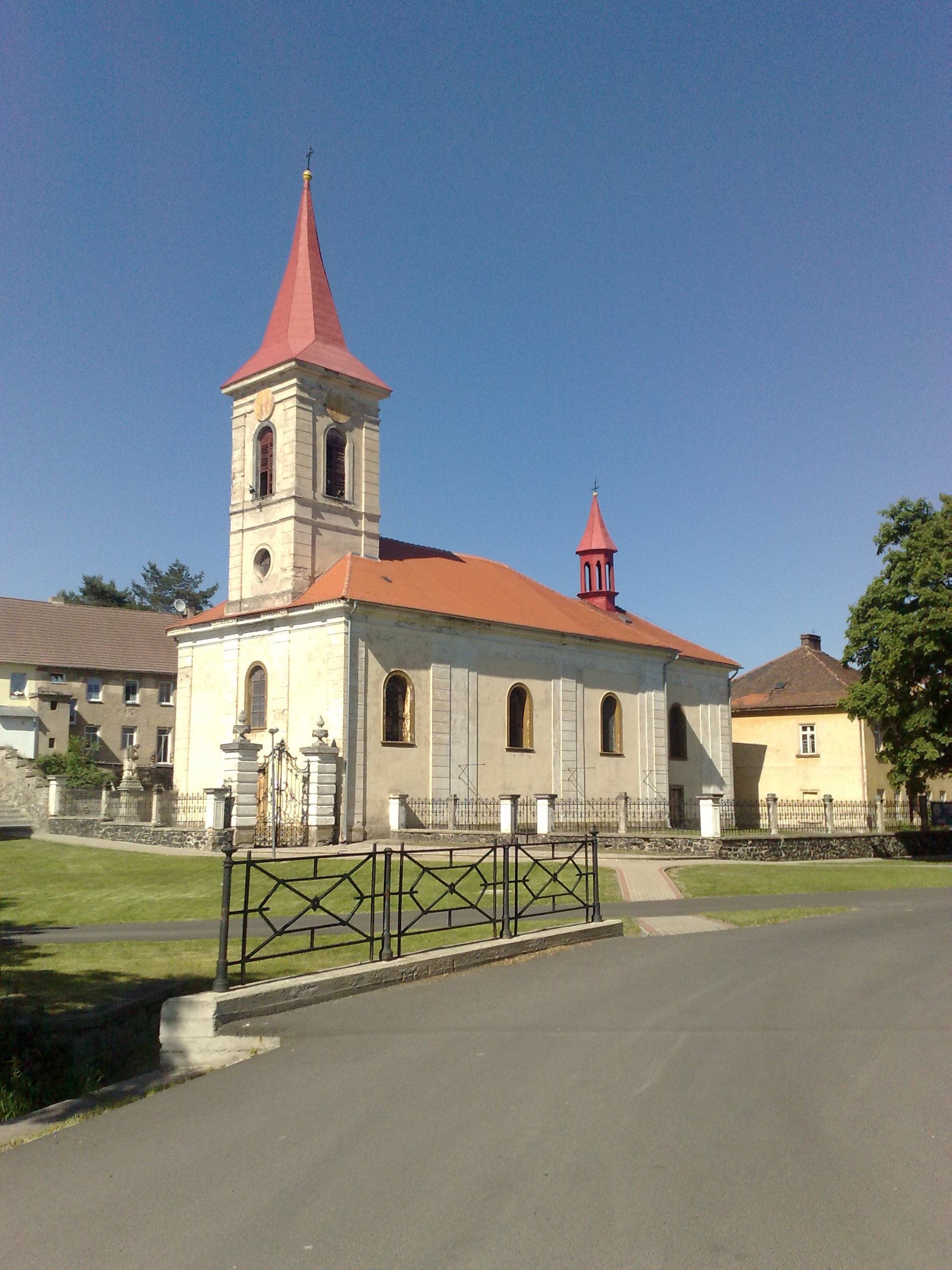 Kostel svatého Apolináře v obci Modlany na Teplicku.